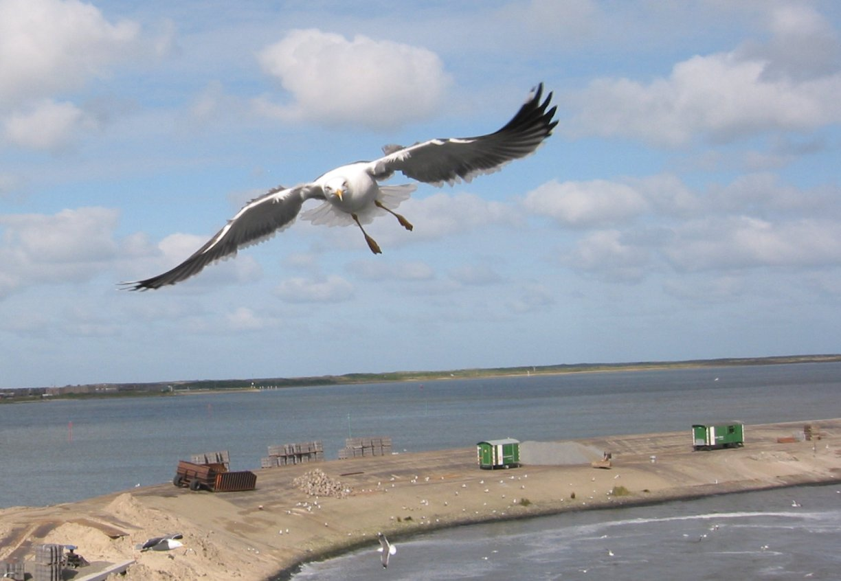 zelfgemaakte foto eind mei van meeuw haven van Texel